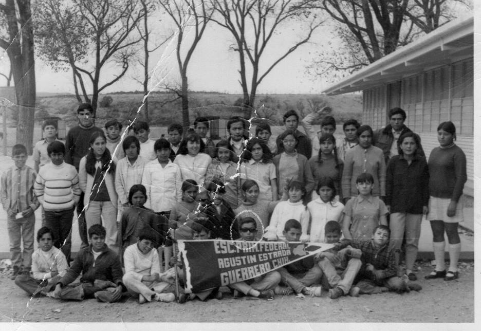 Ricardo Valencia en una de sus pocas fotografías mirando a la cámara, es el niño de lentes encerrado en un circulo blanco. (1963)